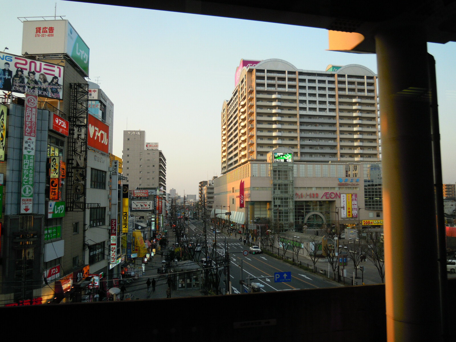 Fuse